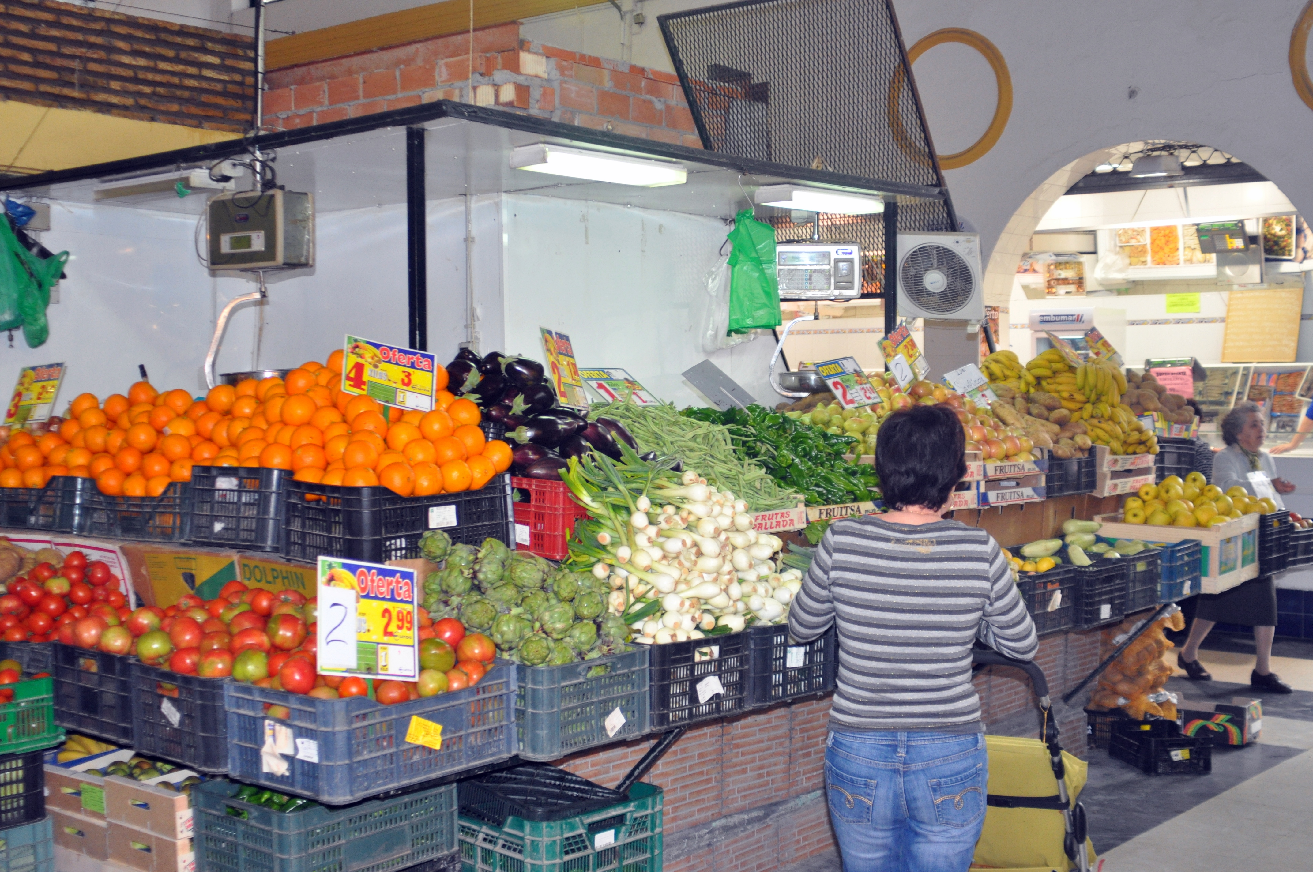 Interior de la plaza de abastos de Sanlúcar de Barrameda (Cádiz, España).